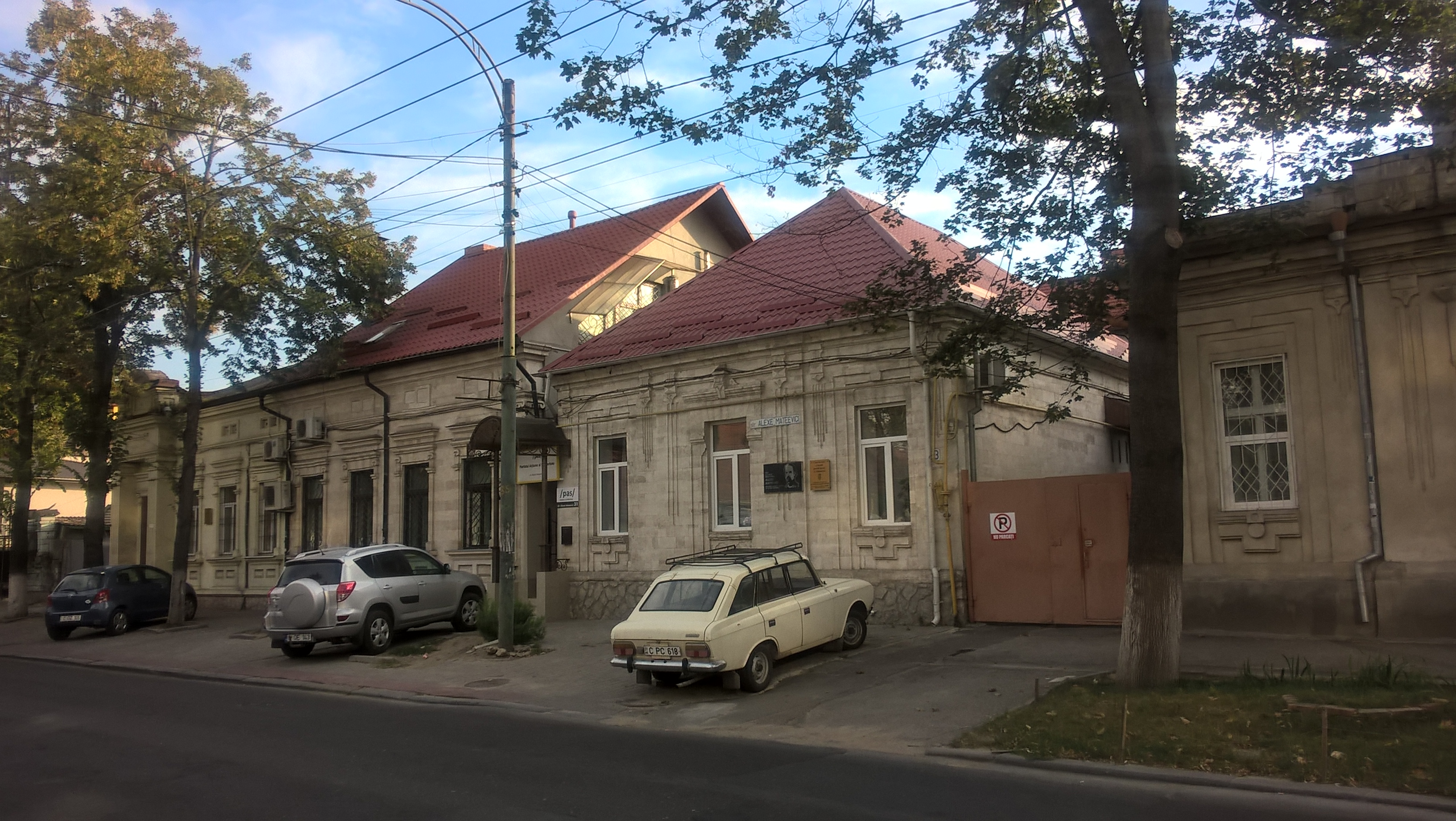 Dom poety Alexeia Mateevici'a w Kiszyniowie (ob. ul. Mateevici 31)